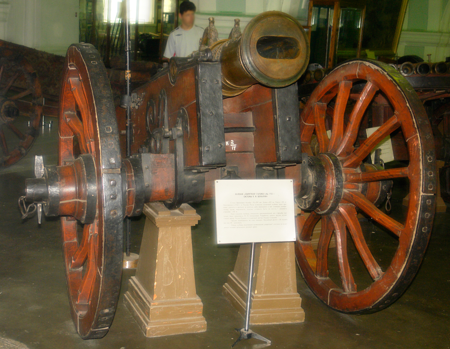 Полевая "секретная" гаубица образца 1753 года системы П. И. Шувалова. Ствол бронзовый. Калибр 95х207 мм. Длина 162 см. Масса 491 кг. Изготовлена в 1753 году в Москве. После успешных испытаний гаубицы сенат приказал "хранить в арсенале за печатью, дабы имеющаяся в ней инвенция, кроме наружности, никому открыта быть не могла". Дальность стрельбы 532 м. Идея создания гаубицы, специально предназначенной для стельбы картечью была предложена П. И. Шуваловым. Разработку нового орудия осуществлили майор Мусин-Пушкин и пушечный мастер Михаил Степанов.